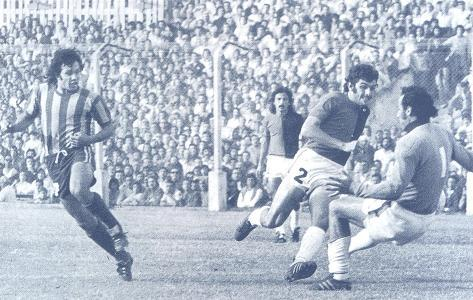 Gol de Ramón Bóveda a Newell's el 28 de abril de 1974, encuentro finalizado con victoria de Central 3-0.